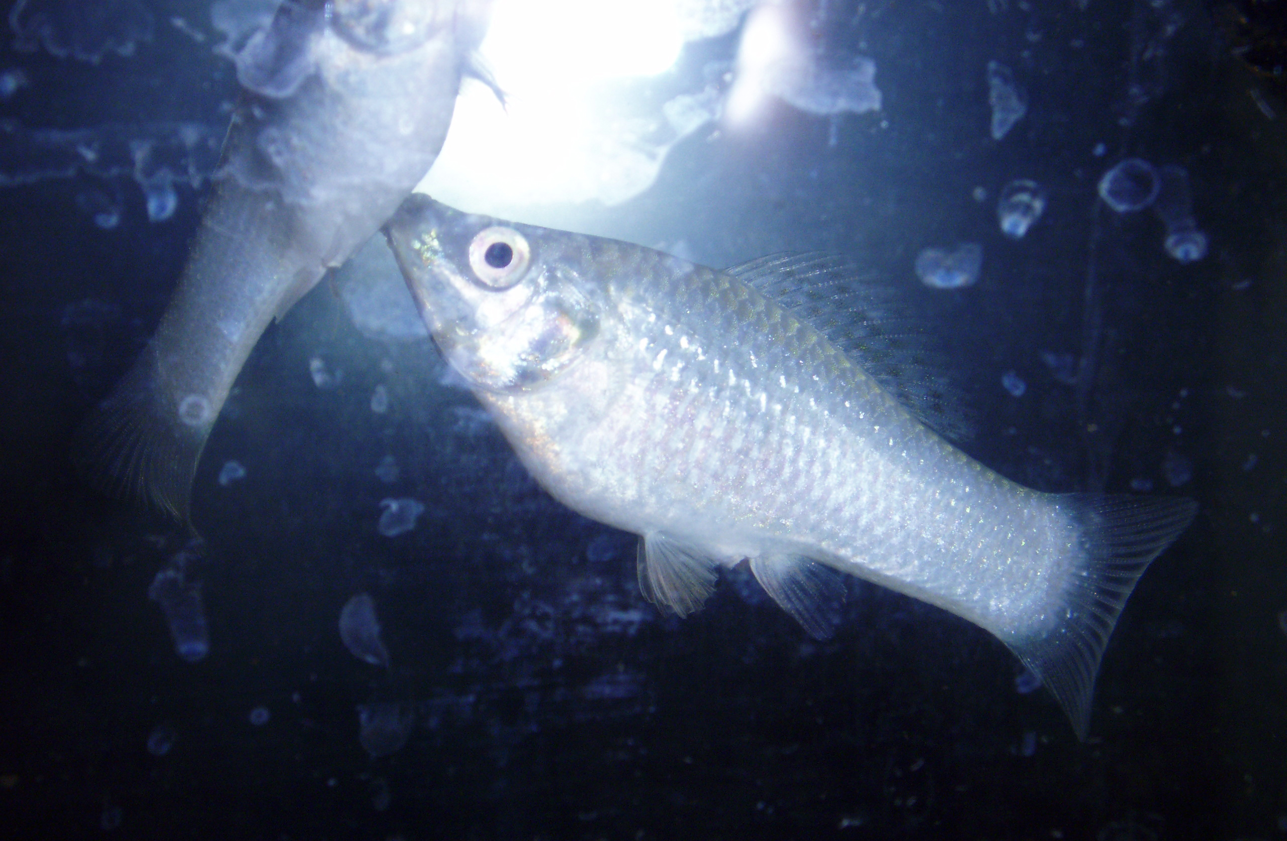 silver mollies